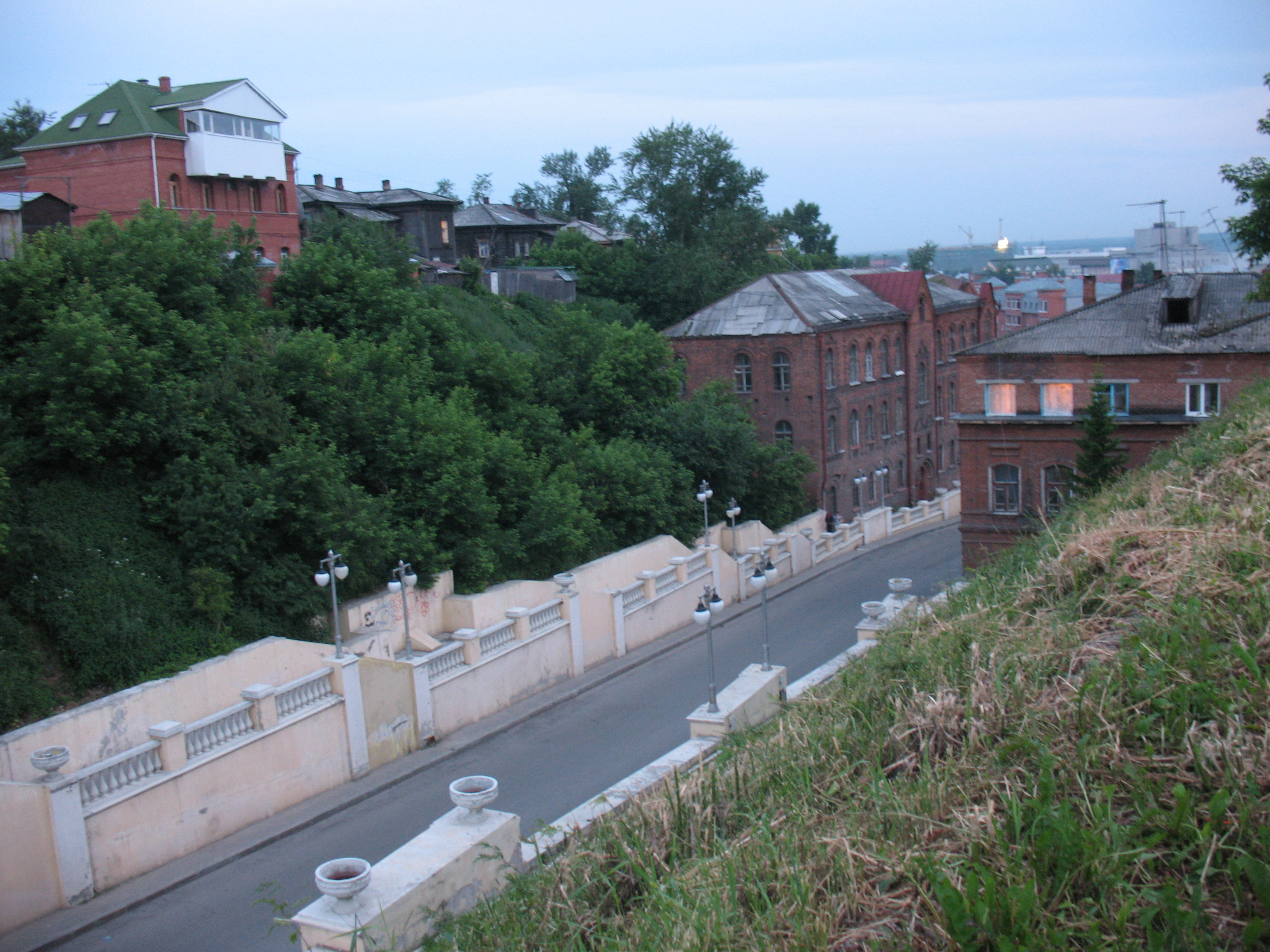 улица Октябрьский взвоз в Томске